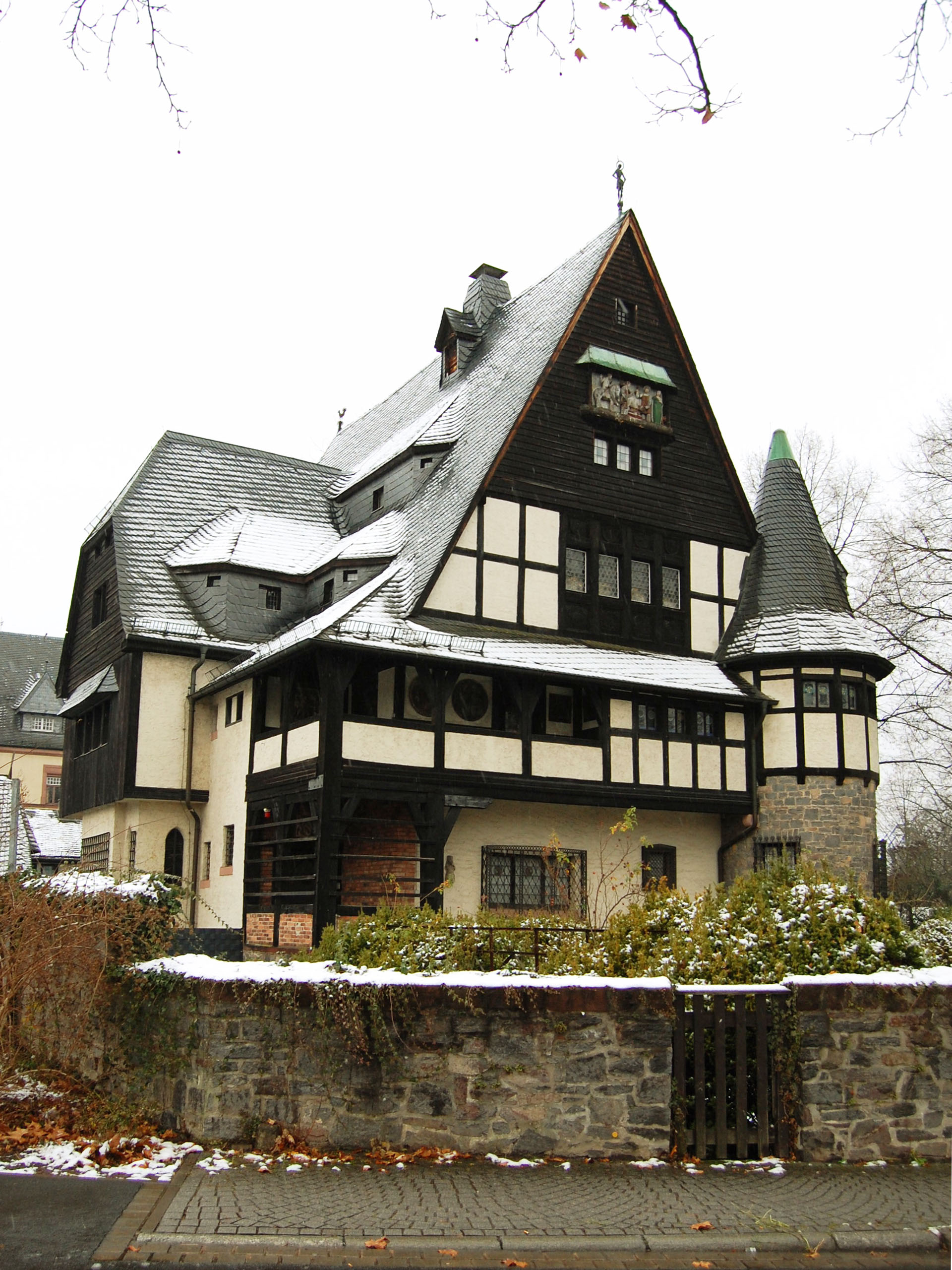 Widok boczny Domu Gentila